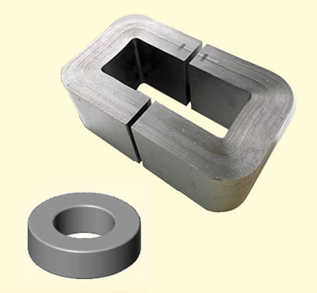 Schnittbandkern und Rundbandkern gewickelt aus einem weichmagnetischen Bandmaterial, beispielsweise metallisches Glasband